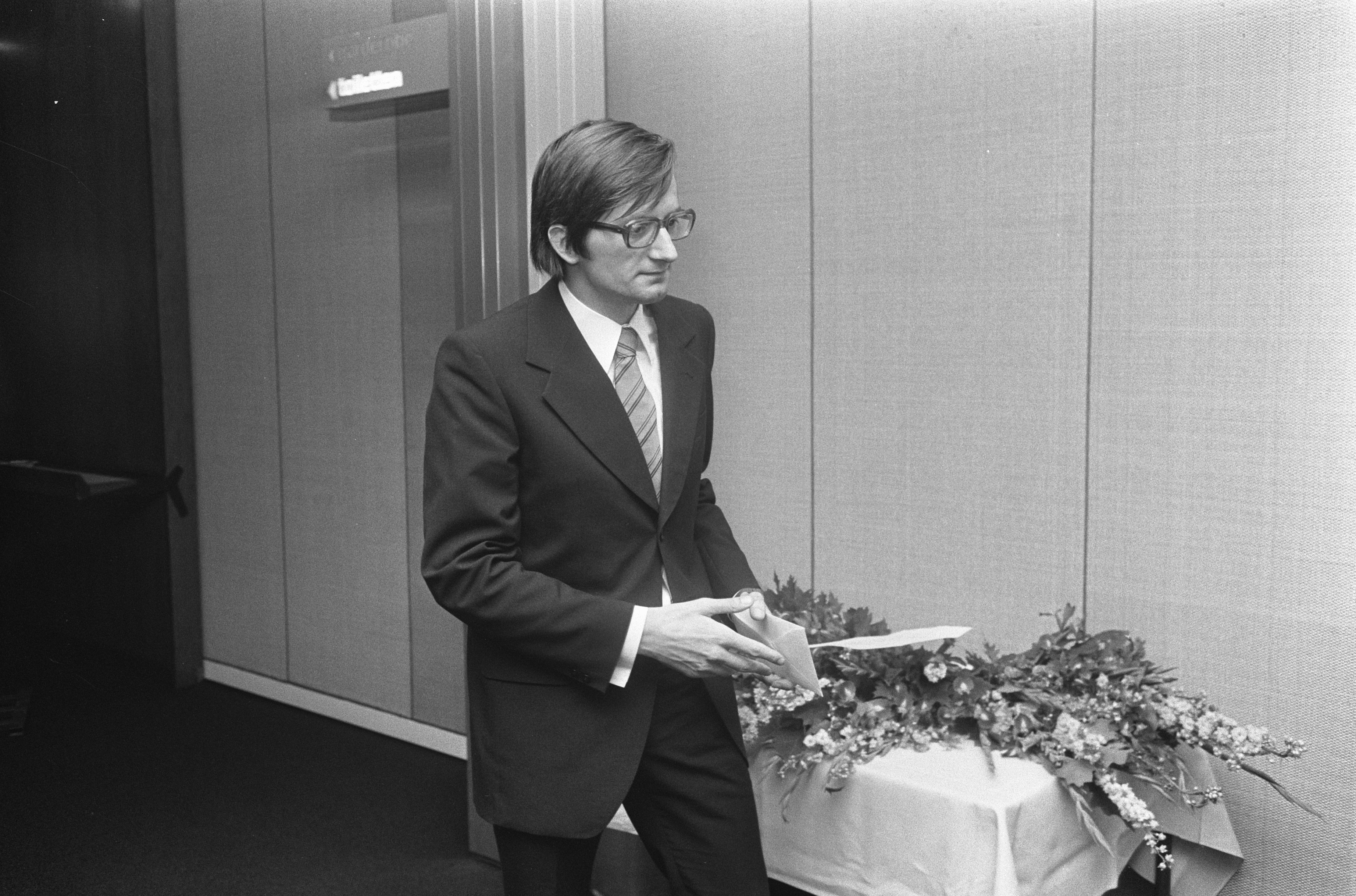 Collectie / Archief : Fotocollectie Anefo Reportage / Serie : [ onbekend ] Beschrijving : Laatste ronde IBM-schaaktoernooi, Planinc (links) krijgt prijs Datum : 4 augustus 1973 Trefwoorden : schaken Instellingsnaam : IBM-Schaaktoernooi Fotograaf : Croes, Rob C. / Anefo Auteursrechthebbende : Nationaal Archief Materiaalsoort : Negatief (zwart/wit) Nummer archiefinventaris : bekijk toegang 2.24.01.05 Bestanddeelnummer : 926-5905